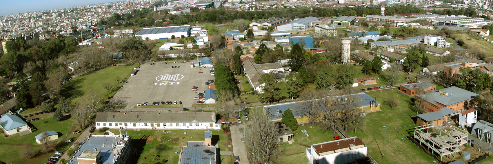 Parque Tecnológico Miguelete